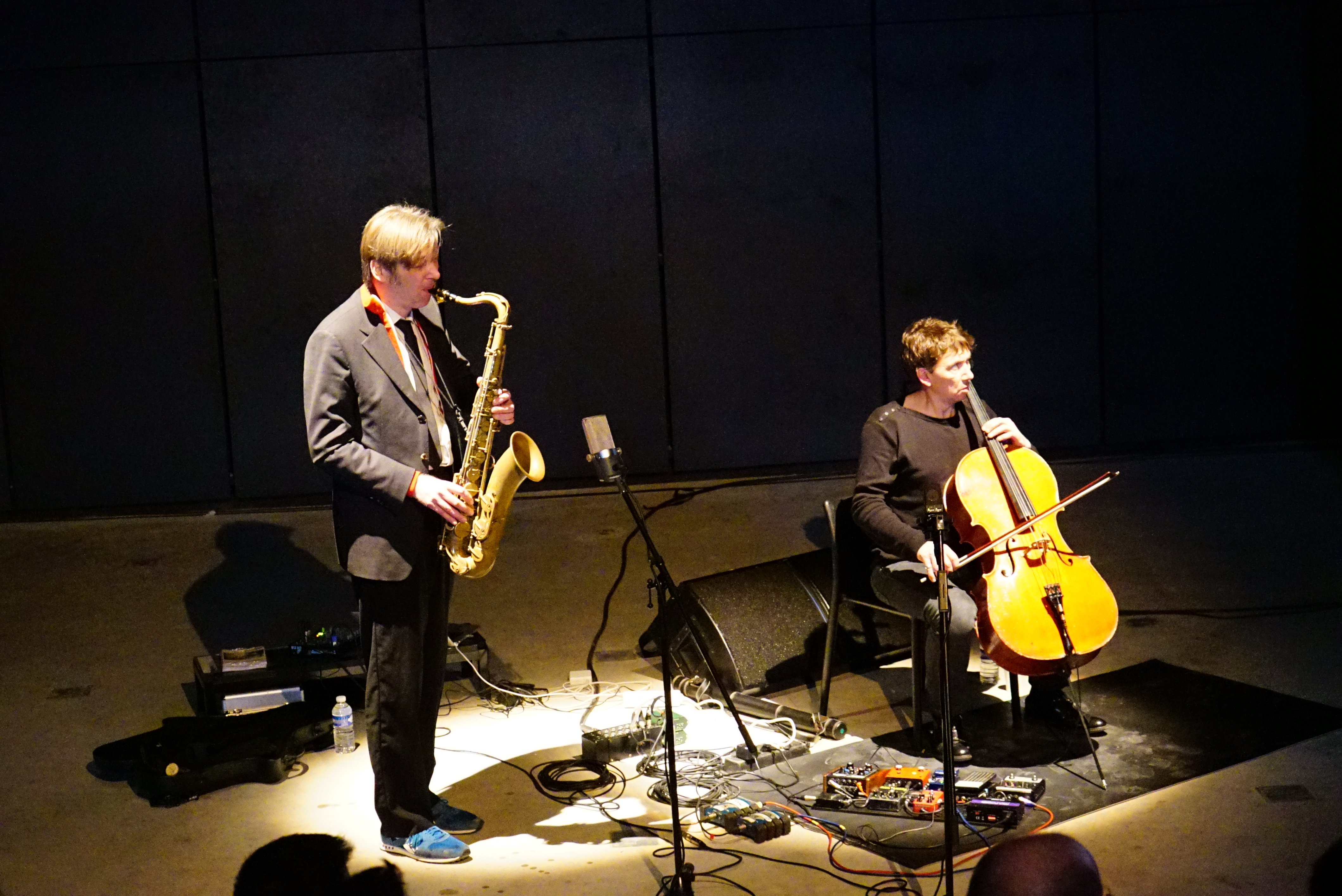 Lors de l'inauguration.